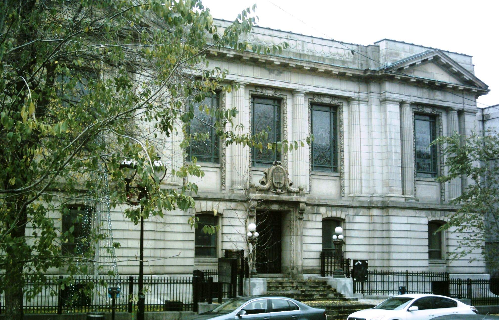 Façade de la bibliothèque Saint-Sulpice, située au 1700 rue Saint-Denis.